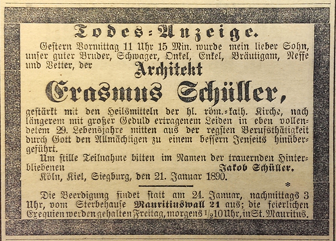 Todesanzeige Architekt Erasmus Schüller, Kölnische Zeitung Mittwoch, 22. Januar 1890, Erste Abendausgabe. Text: Todes=Anzeige. Gestern Vormittag 11 Uhr 15 in. wurde mein lieber Sohn, unser guter Bruder, Schwager, Onkel, Enkel, Bräutigam, Neffe und Vetter, der Architekt Erasmus Schüller, gestärkt mit den Heilsmitteln der hl. röm.=kath. Kirche, nach längerem mit großer Geduld ertragenen Leiden in eben vollen= detem 29. Lebensjahre mitten aus der regsten Berufsthätigkeit durch Gott den Allmächtigen zu einem bessern Jenseits hinüber= geführt. Um stille Teilnahme bitten im Namen der trauernden Hinter= bliebenen Jakob Schüller Köln, Kiel, Siegburg, den 21. Januar 1890 Die Beerdigung findet statt am 24. Januar, nachmittags 3 Uhr, vom Sterbehause Mauritiuswall 21 aus; die feierlichen Exequien werden gehalten Freitag, morgens, 1/2 10 Uhr, in St. Mauritius.